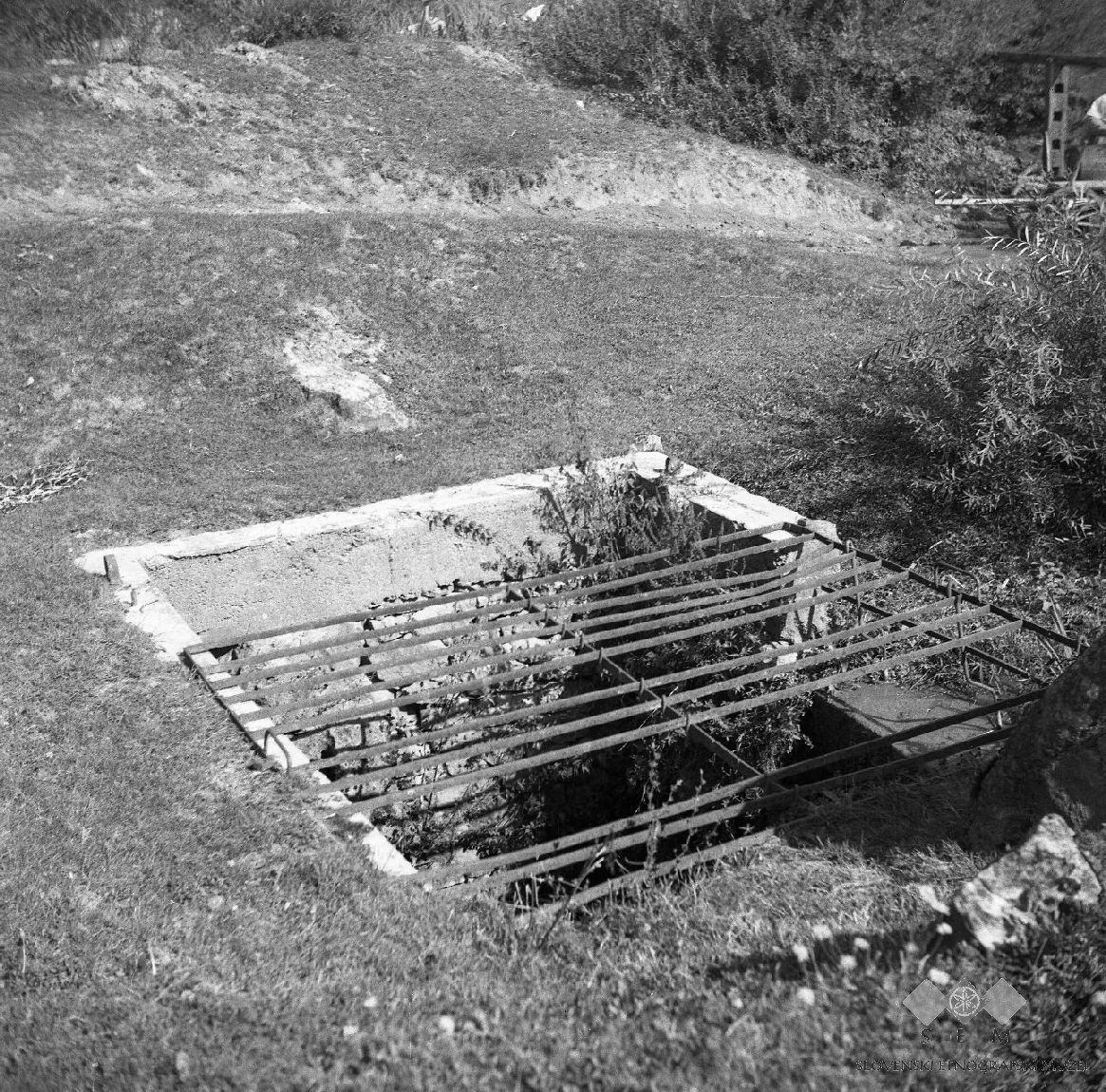 Jama - "požiravənk" v Dobu.